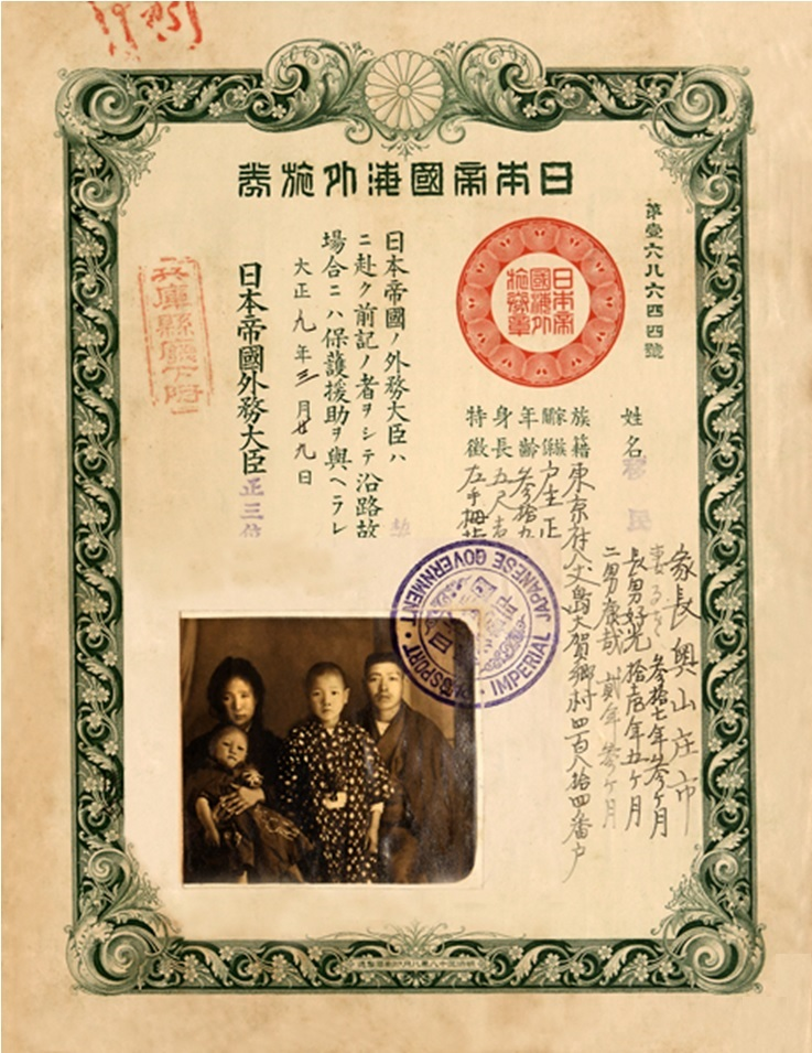 Passaporte do imigrante japonês Skoichi Okuyama, residente em São Vicente, estado de São Paulo, onde se estabeleceu como pescador, requereu naturalização brasileira em 1923. Série Interior / Naturalização.